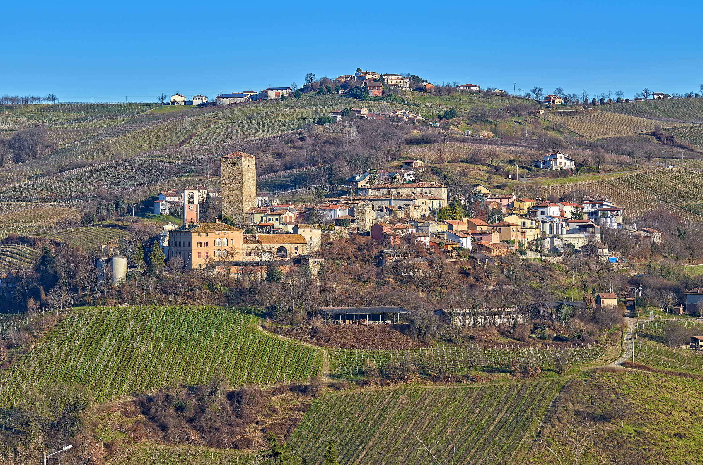 Soriasco